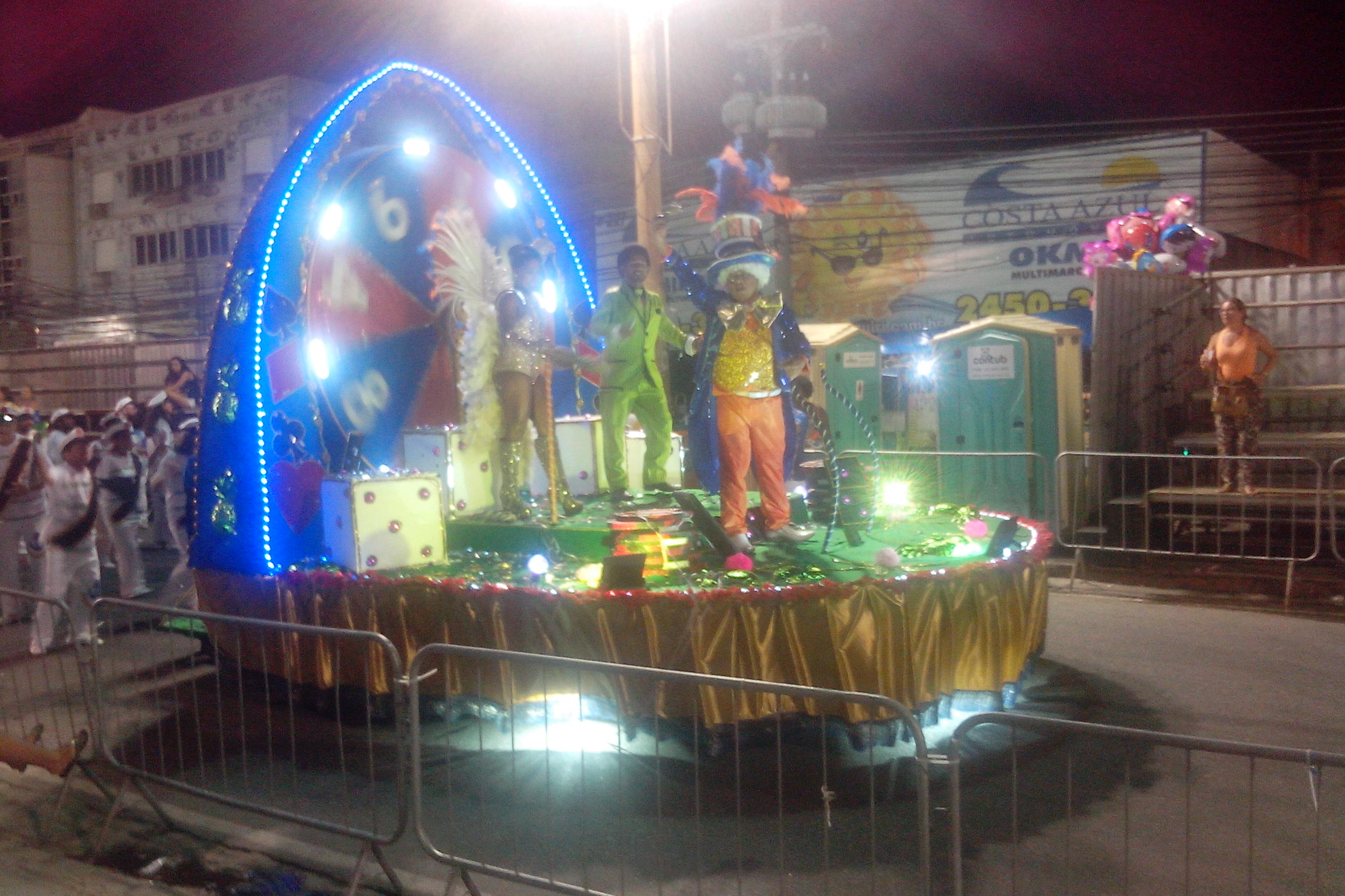 Escola de samba Feitiço do Rio, em seu primeiro desfile, na Intendente Magalhães, di 04 de março de 2017.